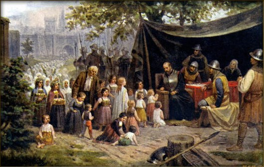 Josef Mathauser - Husité před Naumburkem